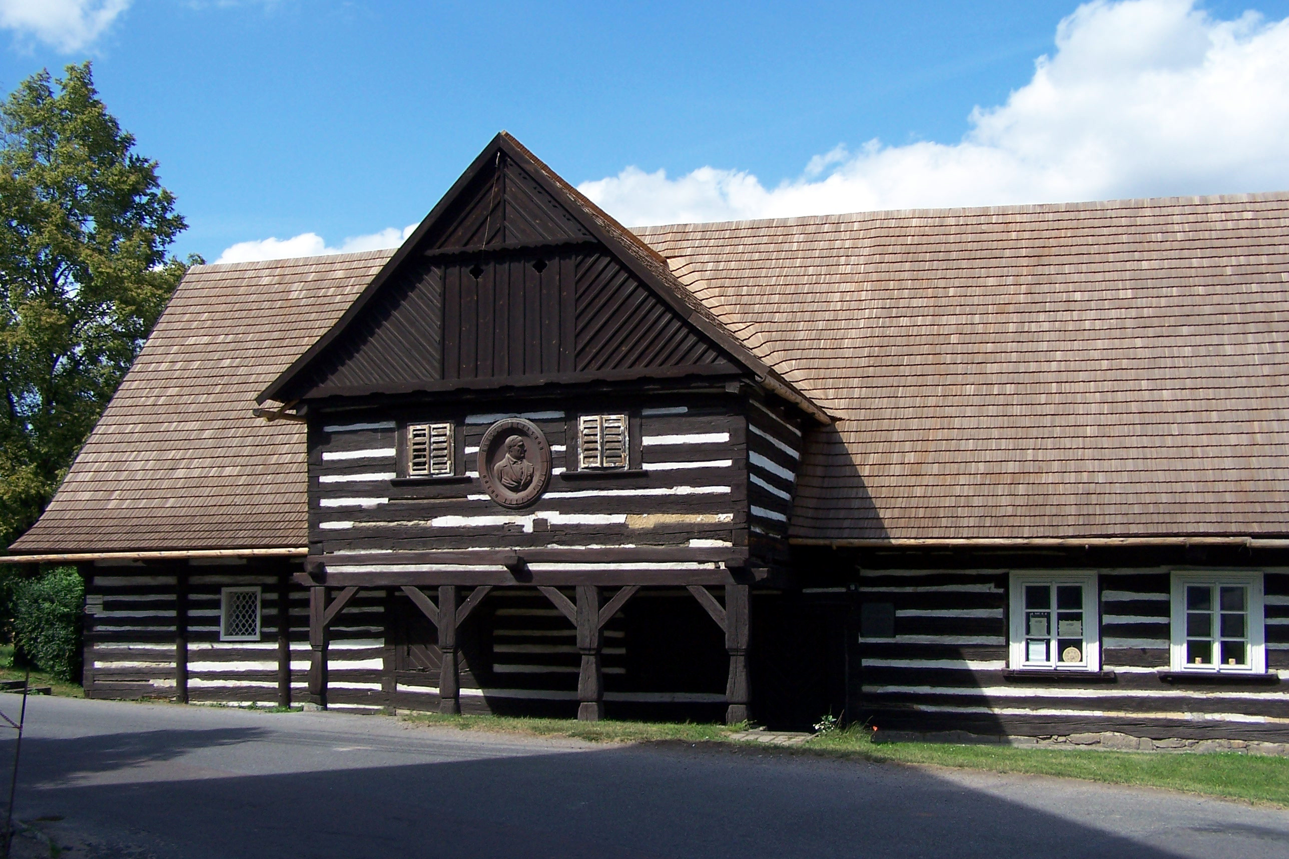 Česky: Hořiněves - Rodný dům Václava Hanky. Loc: 50°18'43.018"N, 15°45'53.105"E